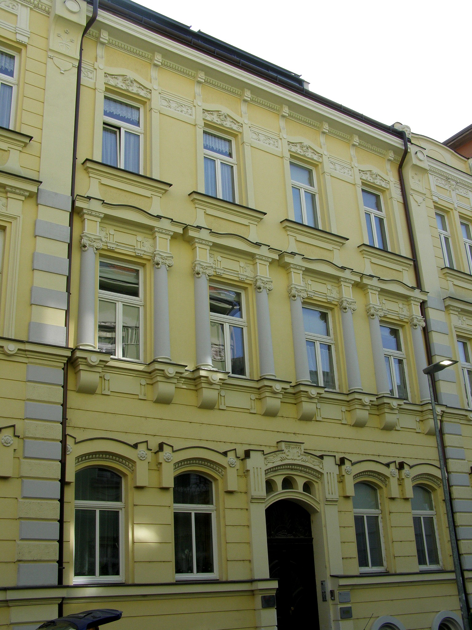 Dom na Tallerovej ul. č. 4 Object location48° 08′ 30.48″ N, 17° 06′ 50.04″ E